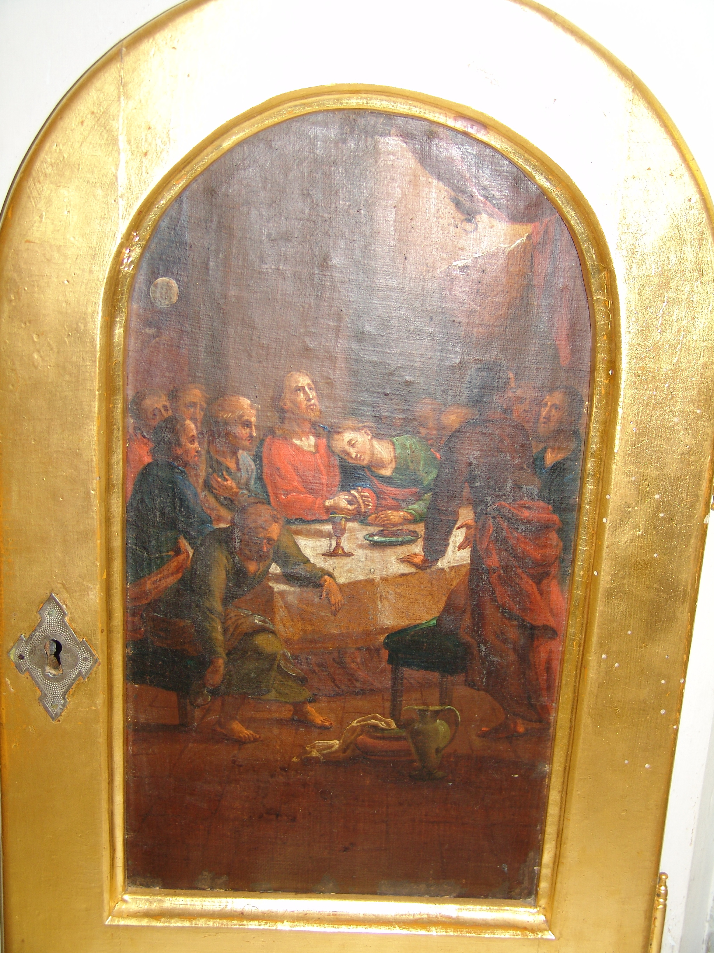 Vrata tabernaklja glavnega oltarja sv. Urha v cerkvi v Hotemažah